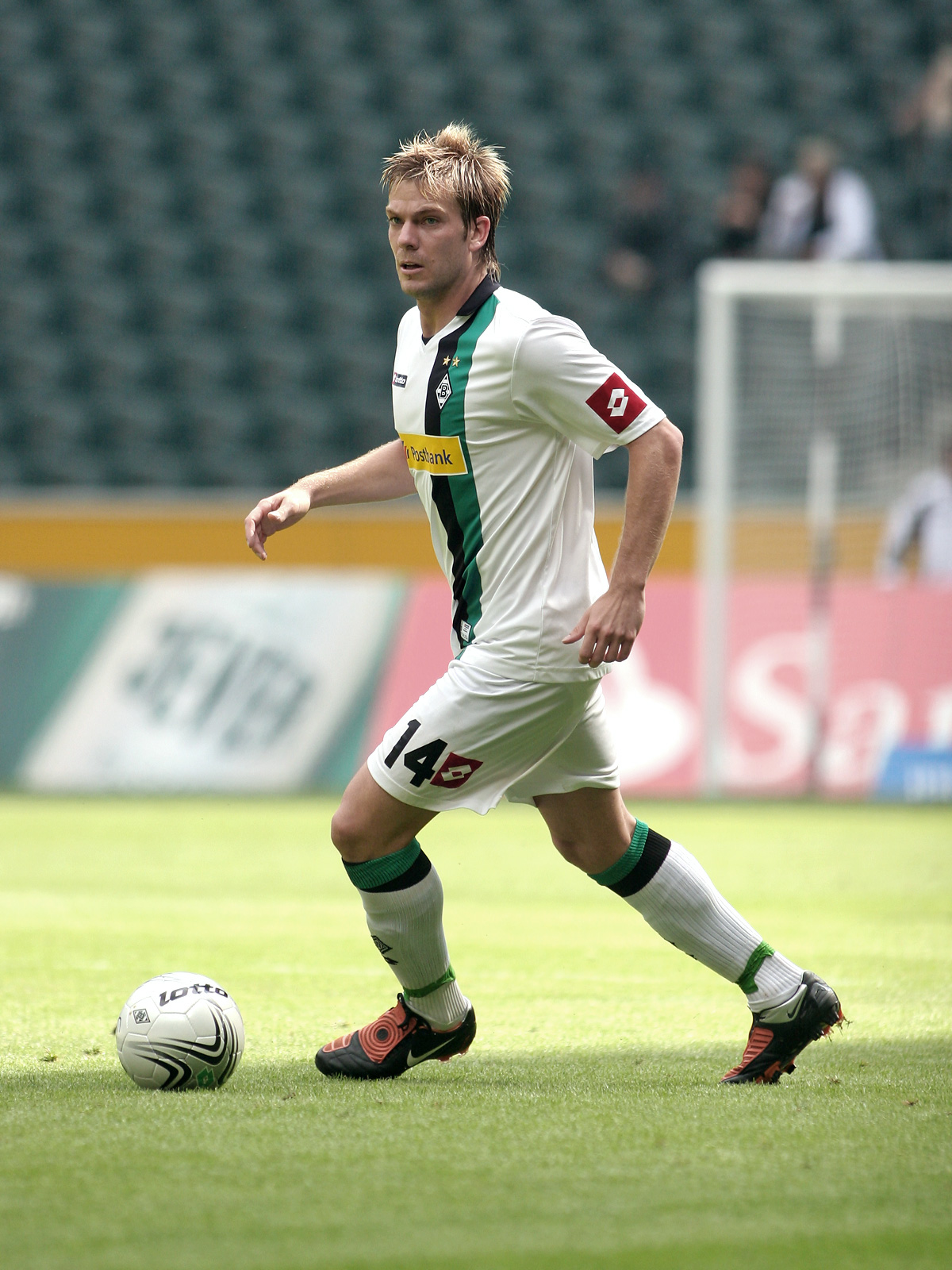 Borussia Mönchengladbachs Mittelfeldspieler Thorben Marx